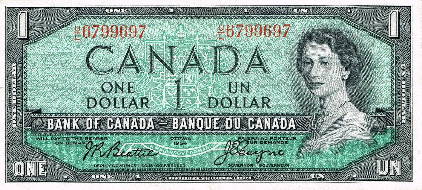 A Bank of Canada 1954-es szériájú 1 dollárosa II. Erzsébet királynő ifjú portréjával.